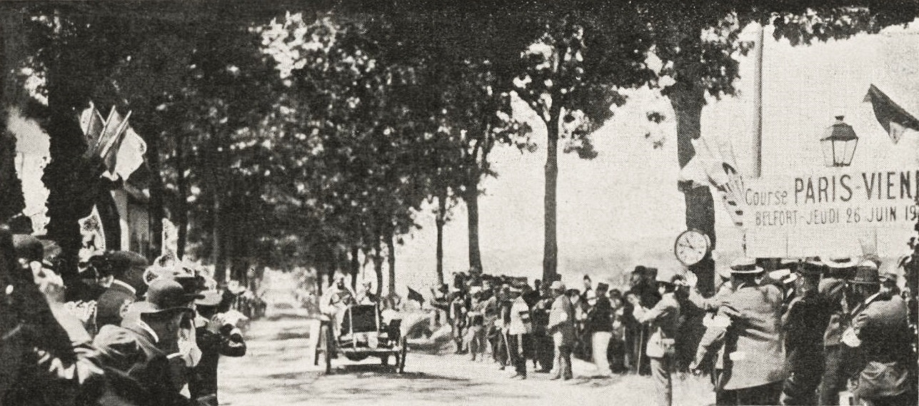 René de Knyff premier au contrôle de Belfort (Paris-Vienne 1902) - Le Sport universel illustré du 6 juillet 1902, p.428